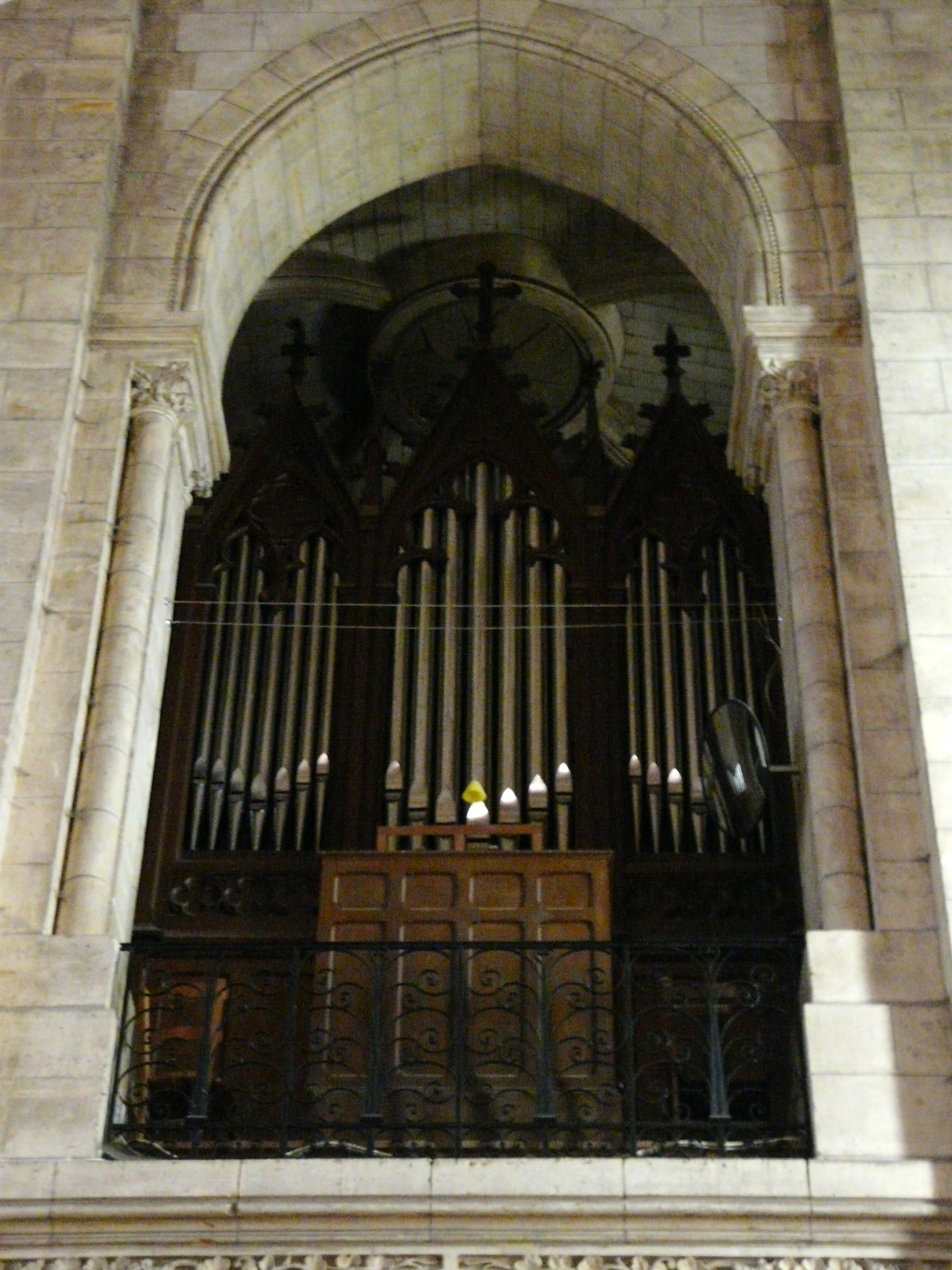 L'orgue de l'église Saint-Sulpice du Bugue, Dordogne, France.